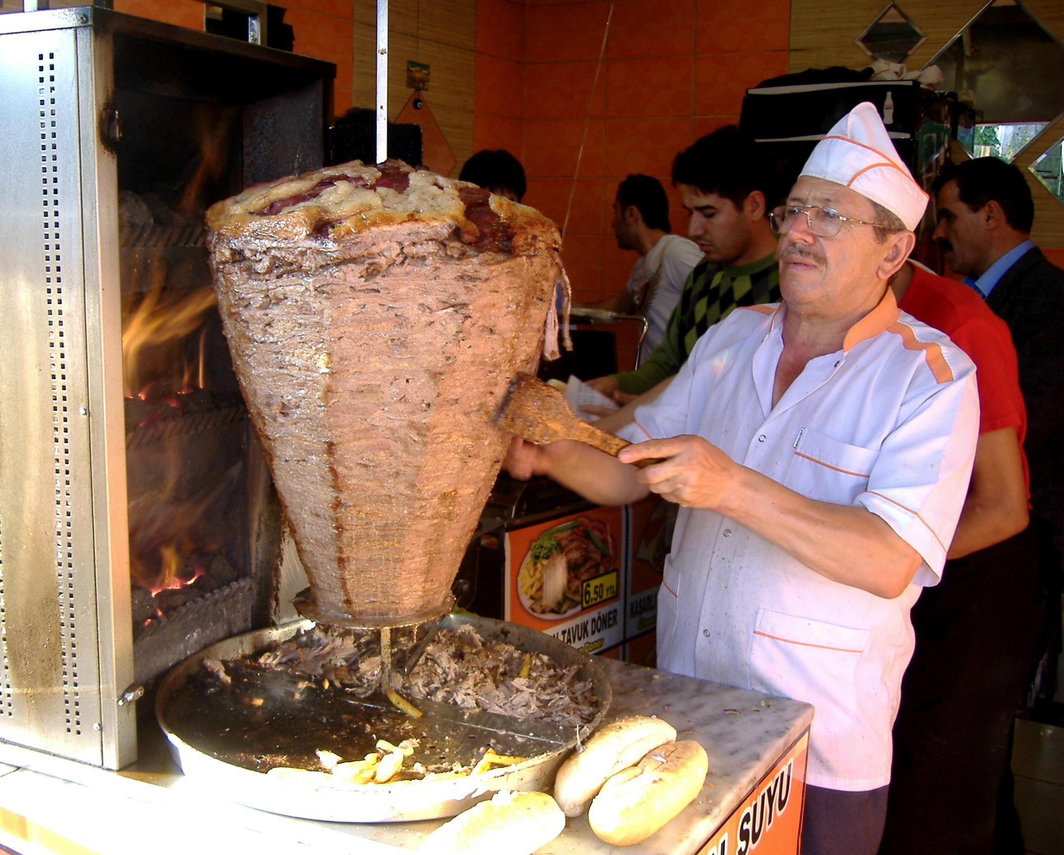 Doner at Istanbul